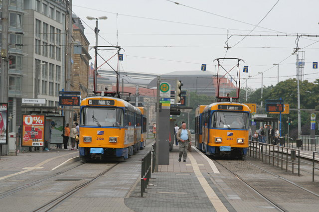 Haltestelle Goerdelerring, 3 km from Leipzig, Deutschland (Zone 33).